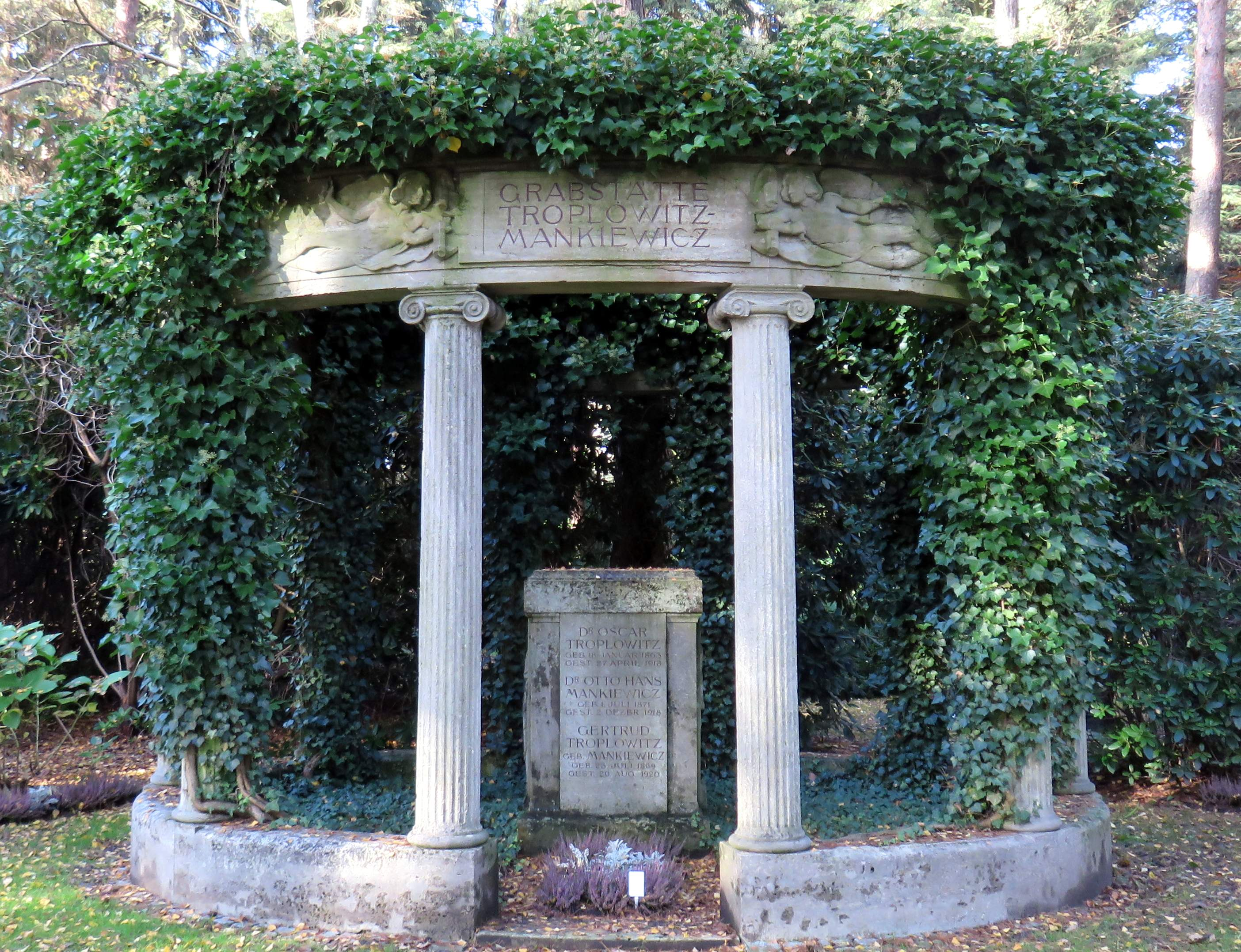 Grabmal Troplowitz-Mankiewicz auf dem Hamburger Friedhof Ohlsdorf; errichtet nach Entwurf von Fritz Schumacher, Relief "Orpheus und Eurydike" von Bildhauer Arthur Bock; für den Unternehmer Oscar Troplowitz, seine Ehefrau Gertrud Troplowitz geb. Mankiewicz und seinen Schwager Otto Hans Mankiewicz; nachempfunden dem Grabmal der Eltern von Troplowitz in Breslau